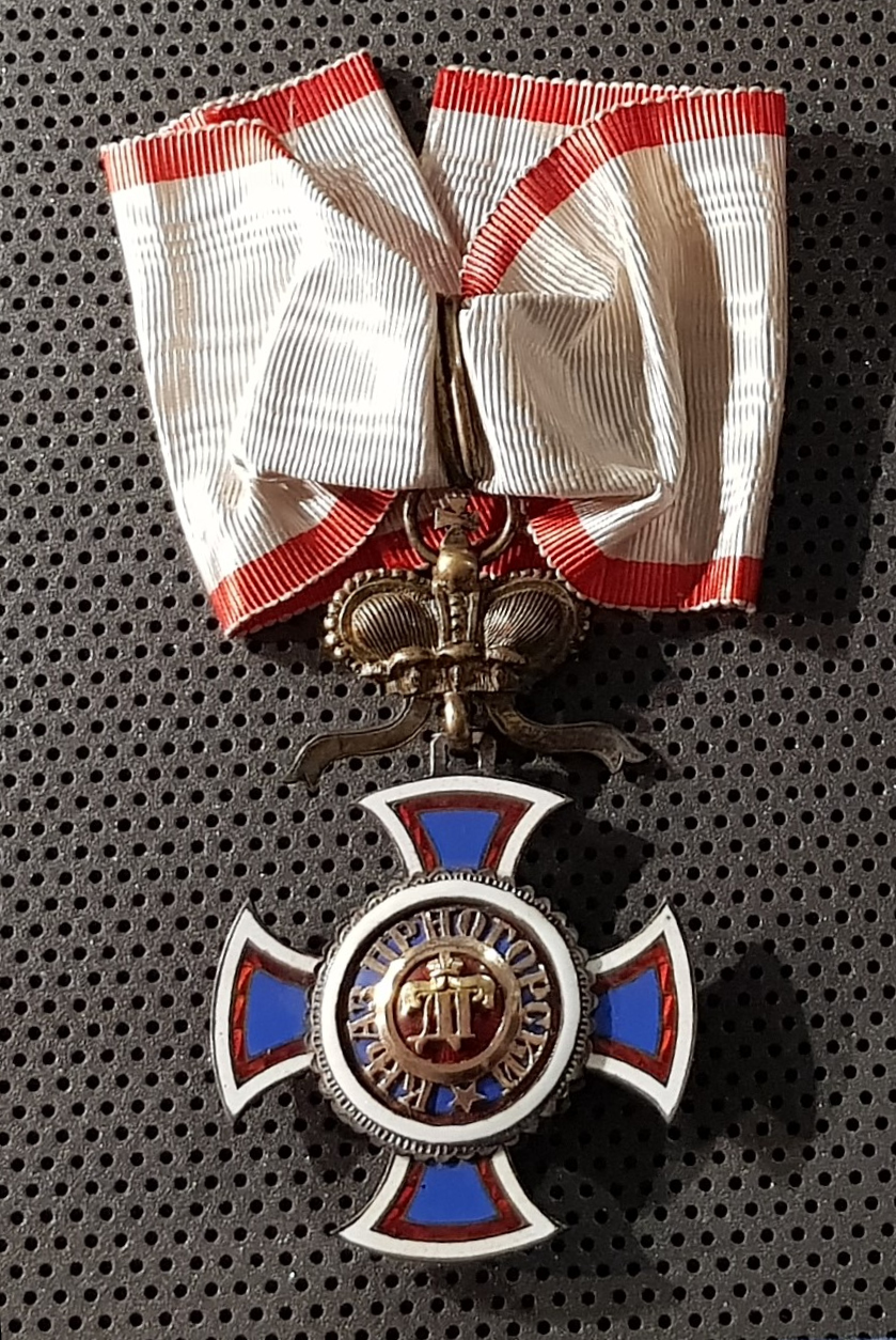 Krzyż Komandorski Orderu Daniły I (Królestwo Czarnogóry)